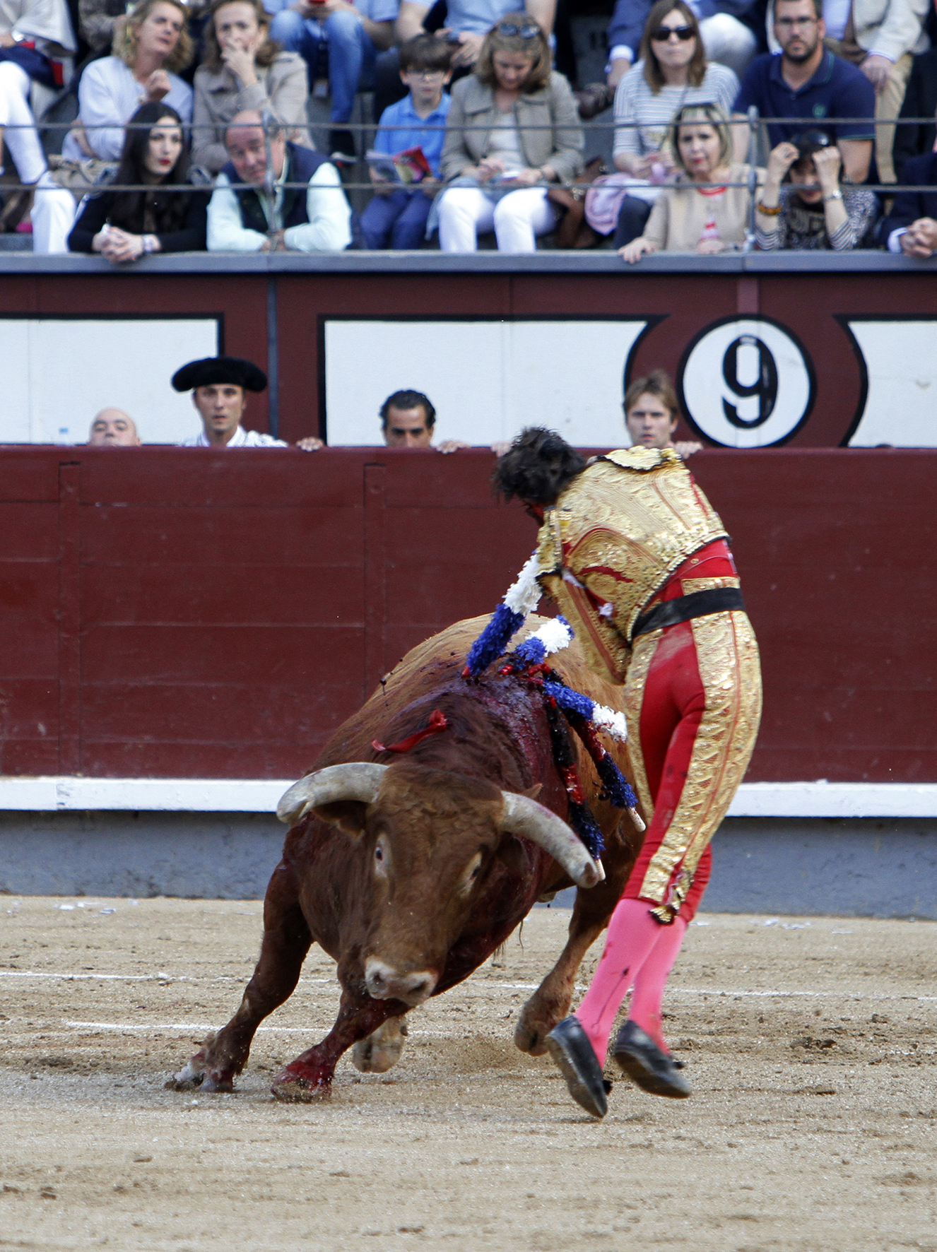 Juan José Padilla clavando un par al violín a un toro de Parladé, en Las Ventas, Madrid, el 26 de mayo de 2016